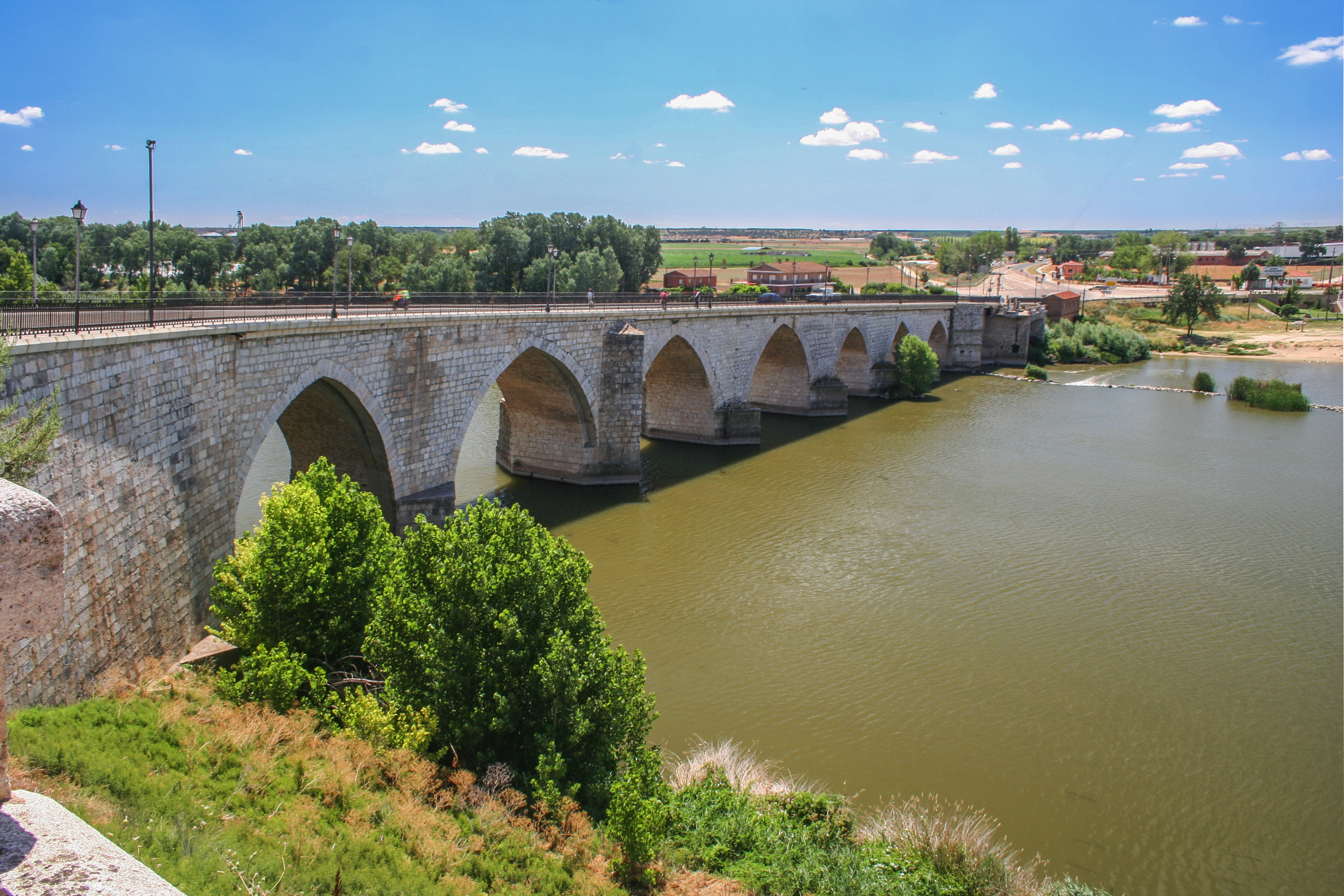 Puente sobre el río Duero a su paso por Tordesilla.